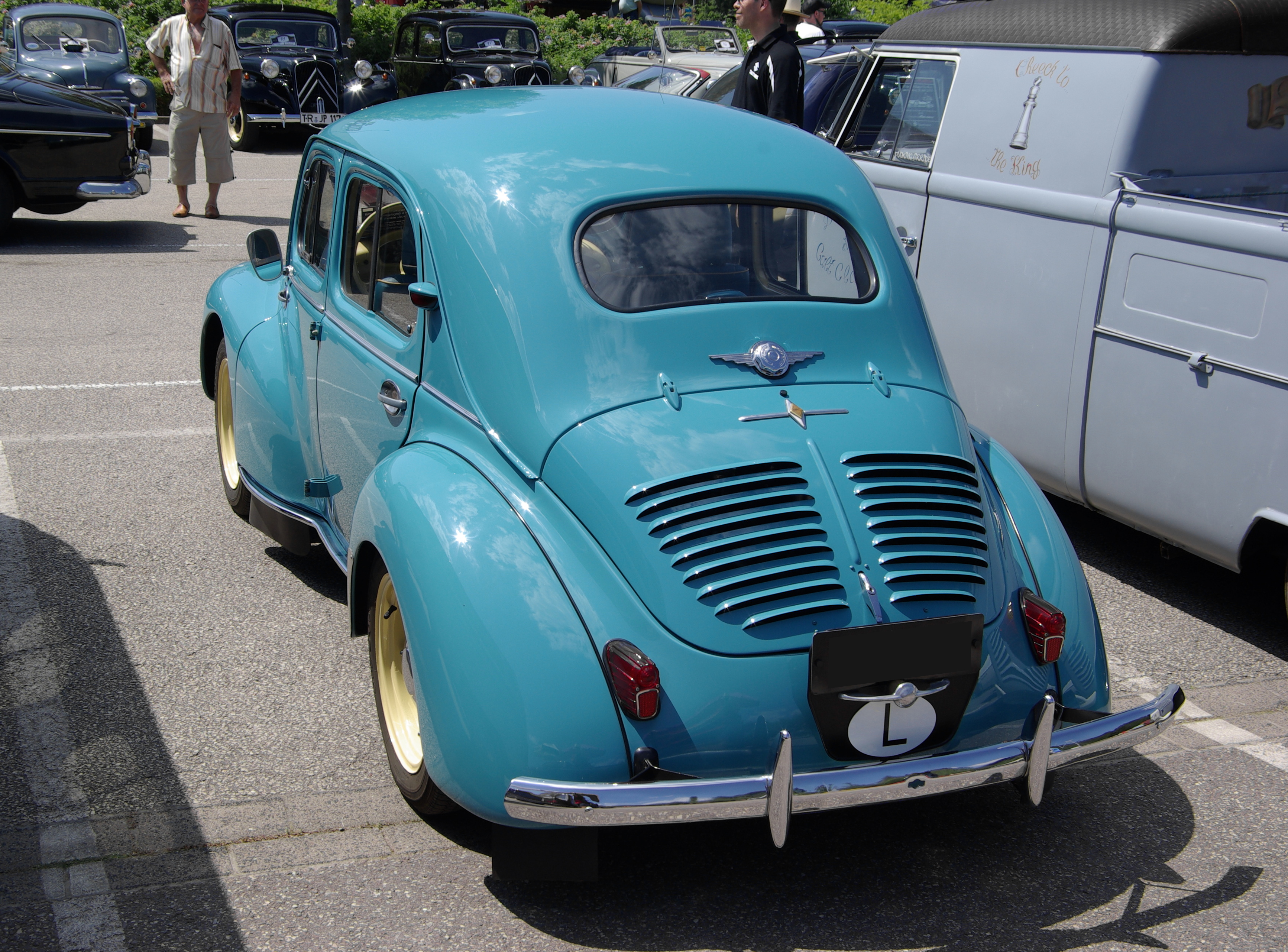 Renault 4 CV, 1956, 29. Internationales Oldtimer-Treffen, Konz